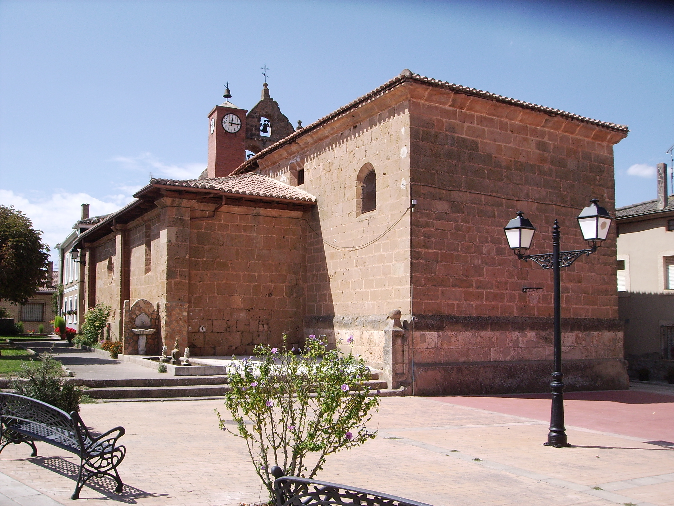 Iglesia de la localidad de Solduengo